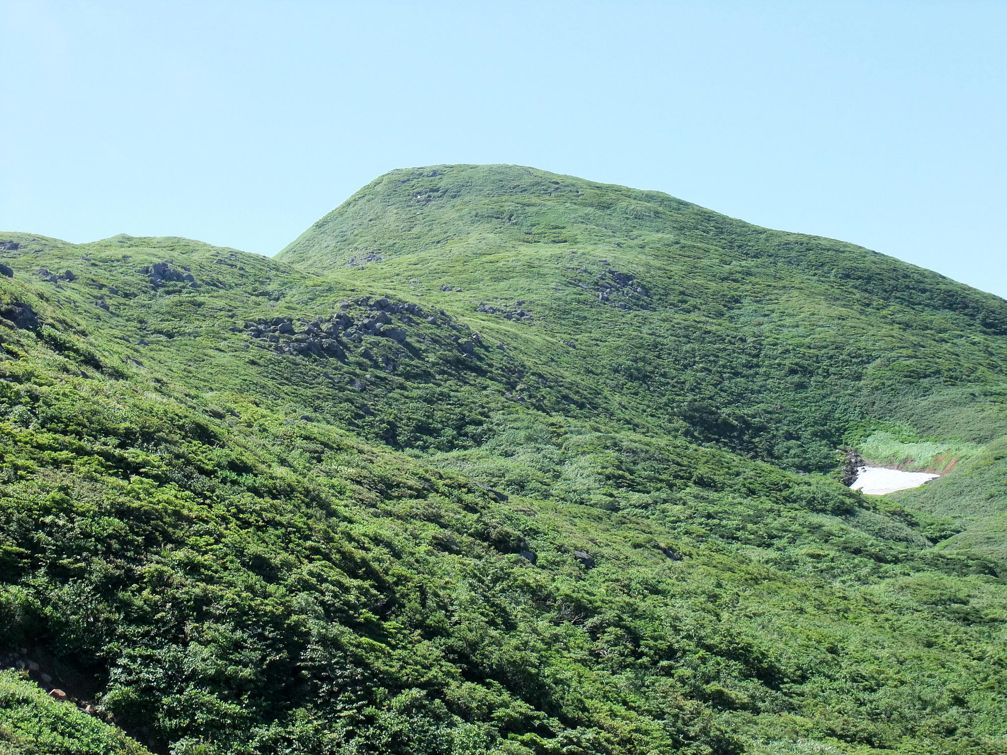 東鳴瀬ルート9合目から見た焼石岳